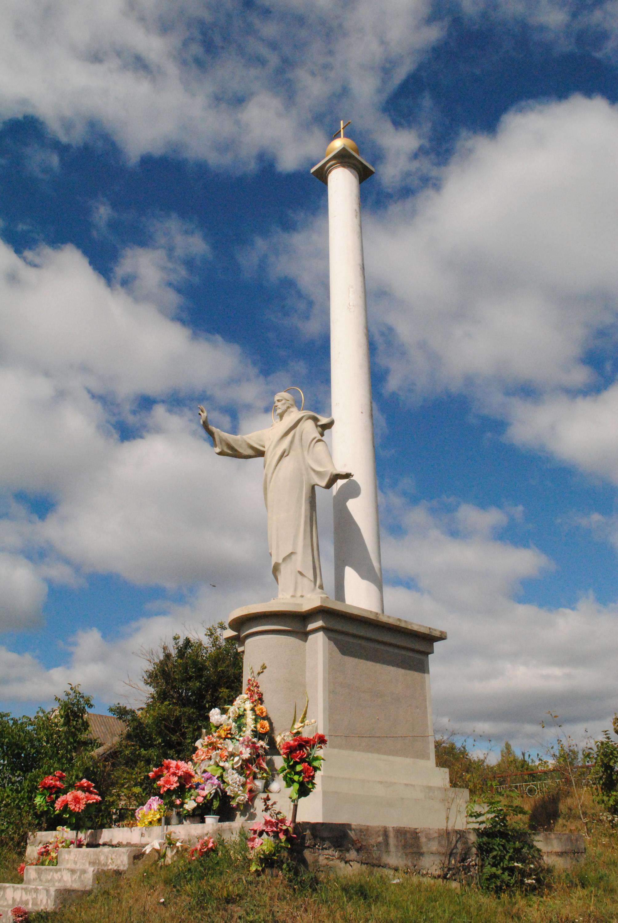 Монумент Христові-Спасителю (Бучач) в Бучачі Тернопільської області на роздоріжжі вулиць генерала Шухевича і Грушевського, т. зв. Чортківському роздоріжжі. Автор — Роман Вільгушинський.